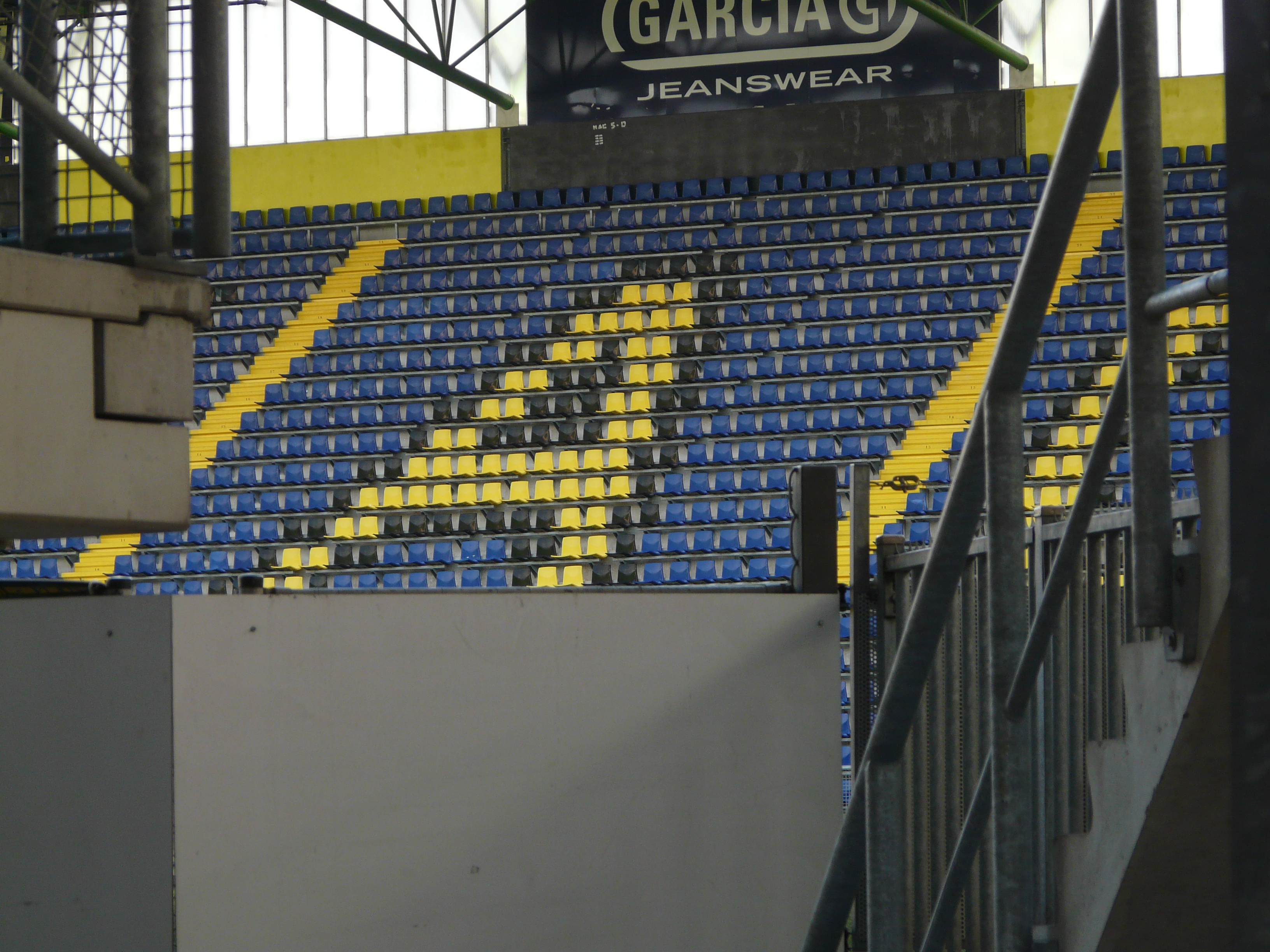 NAC Stadion